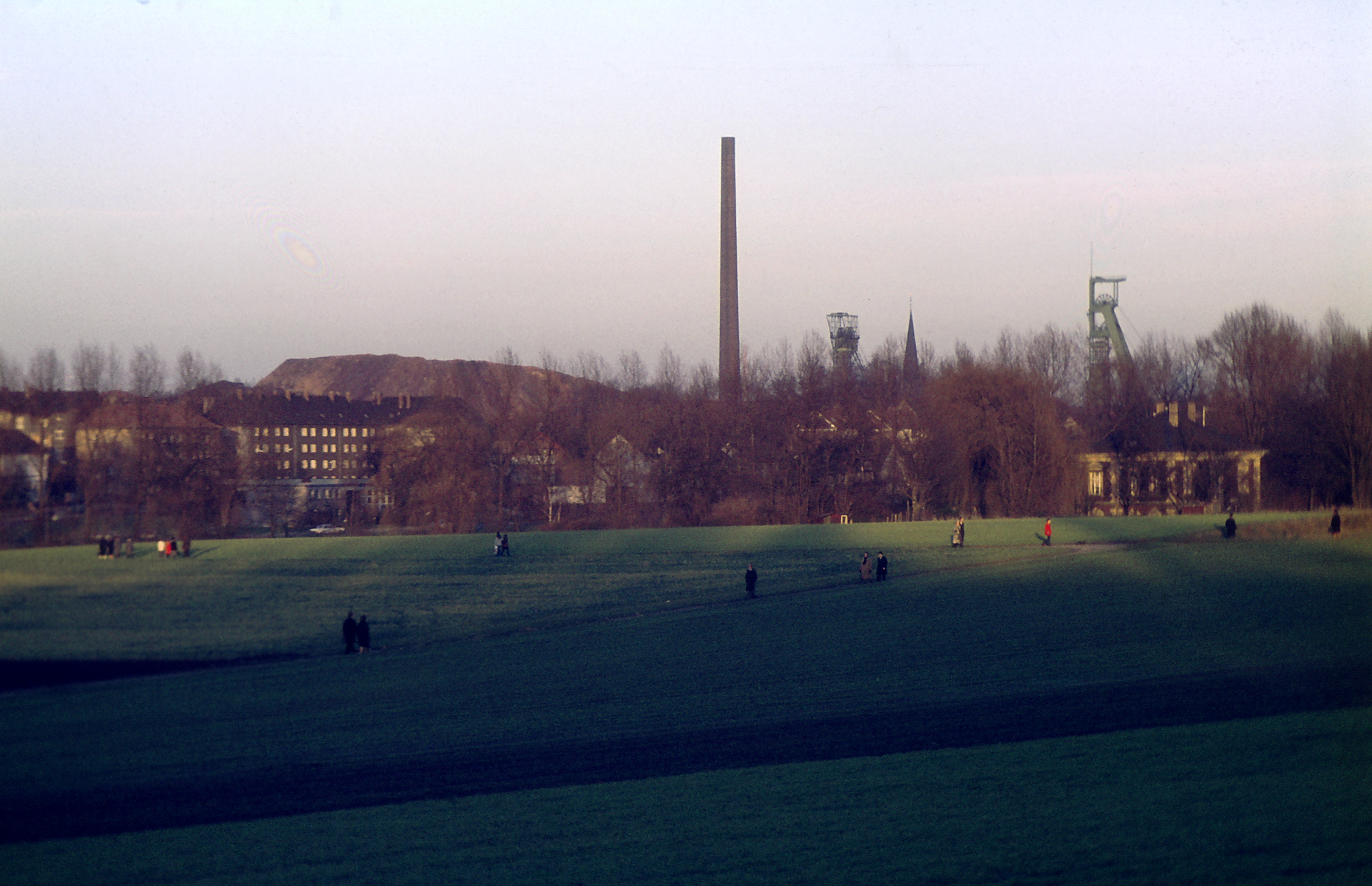 Zeche Mont Cenis 1/3 mit der damaligen Bergehalde - links im Bild - in Herne-Sodingen. Scan von einem Farbdia.